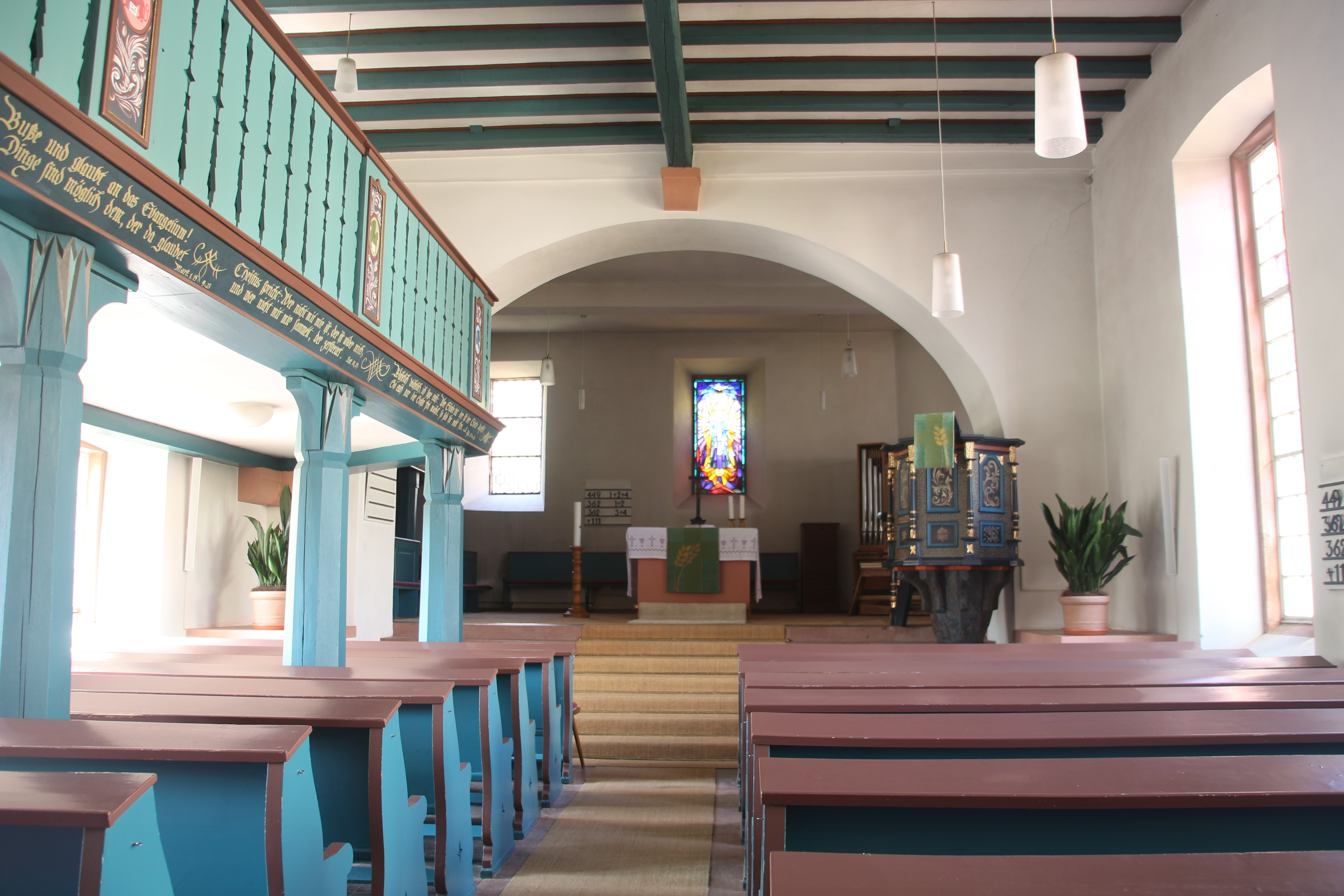 Evangelische Kirche Fauerbach, Gemeinde Nidda, Wetteraukreis, Hessen